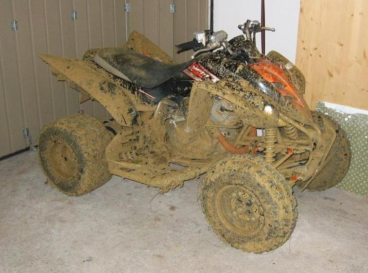 Yamaha Raptor 350 nach Offroadrennen